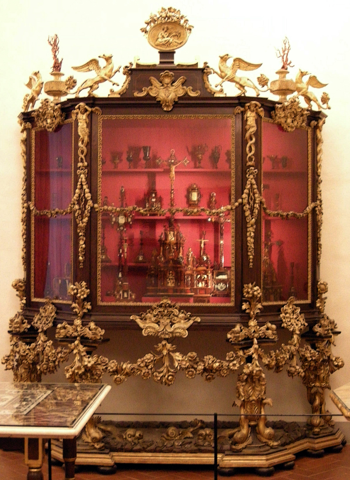 Museo degli argenti, vetrina